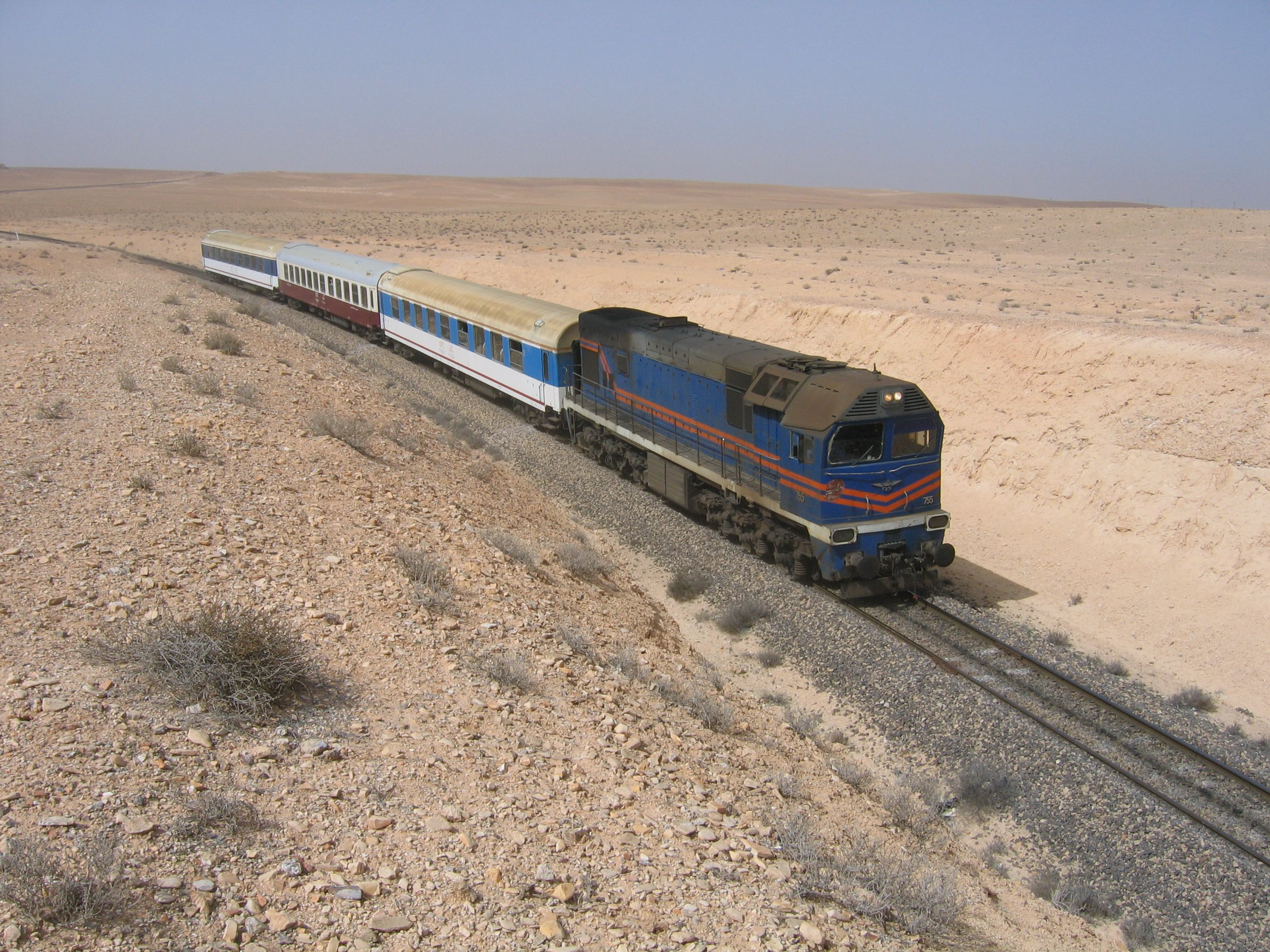 Auf der Strecke Mahin-Al Sharkia, eigene Aufnahme, 24.2.2007